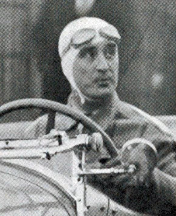 Albert Perrot en 1935, à la côte de Chanteloup (sur Delahaye).